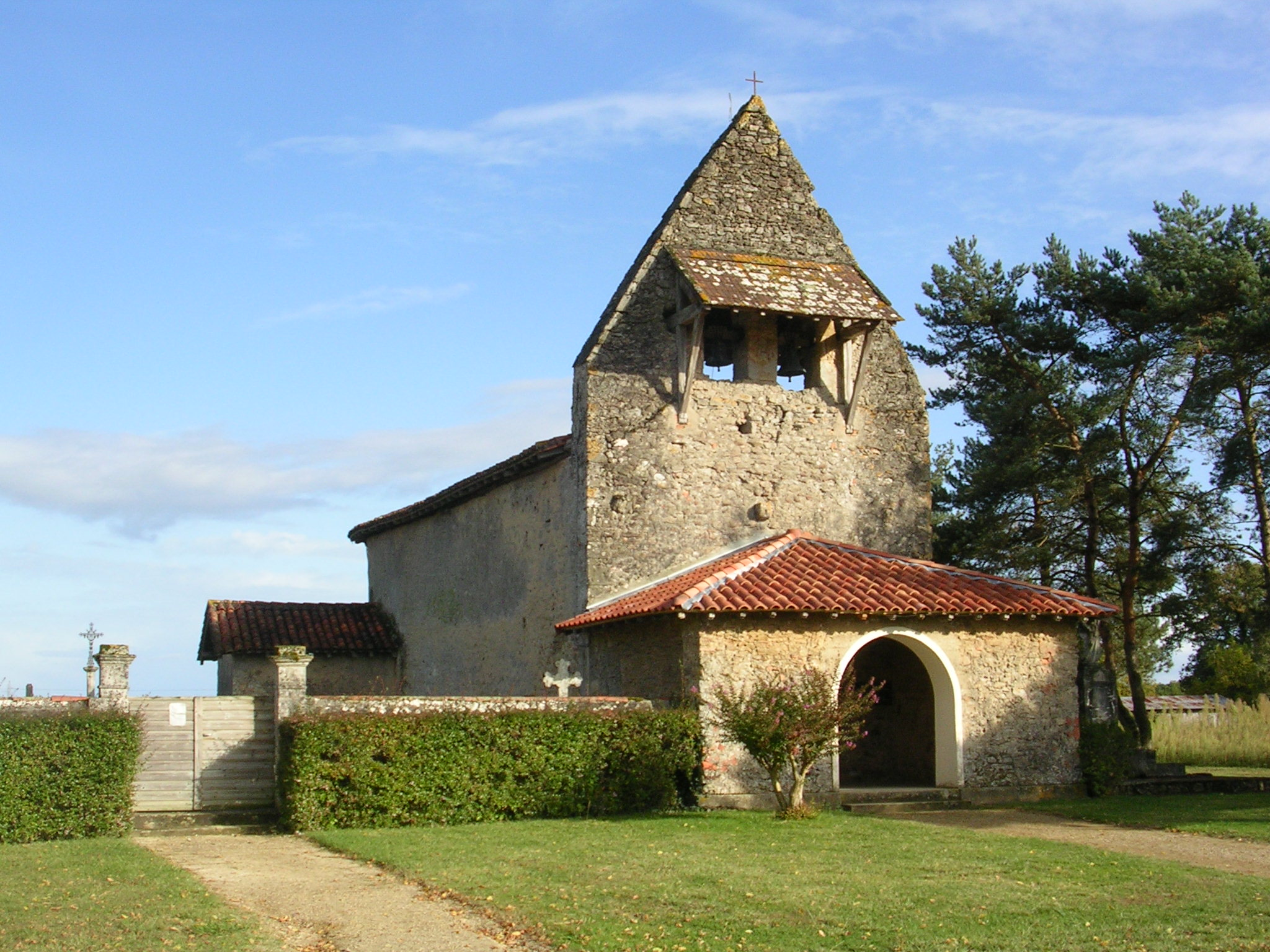 Chapelle Notre-Dame de la Course Landaise, à Bascons, dans le département français des Landes.